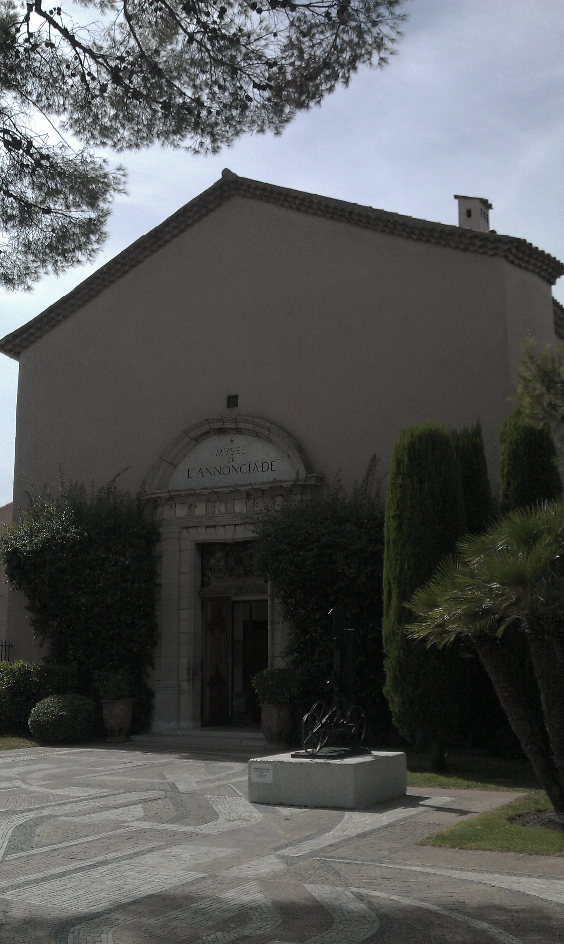 Chapelle de l'Annonciade de Saint-Tropez (Inscrit) .